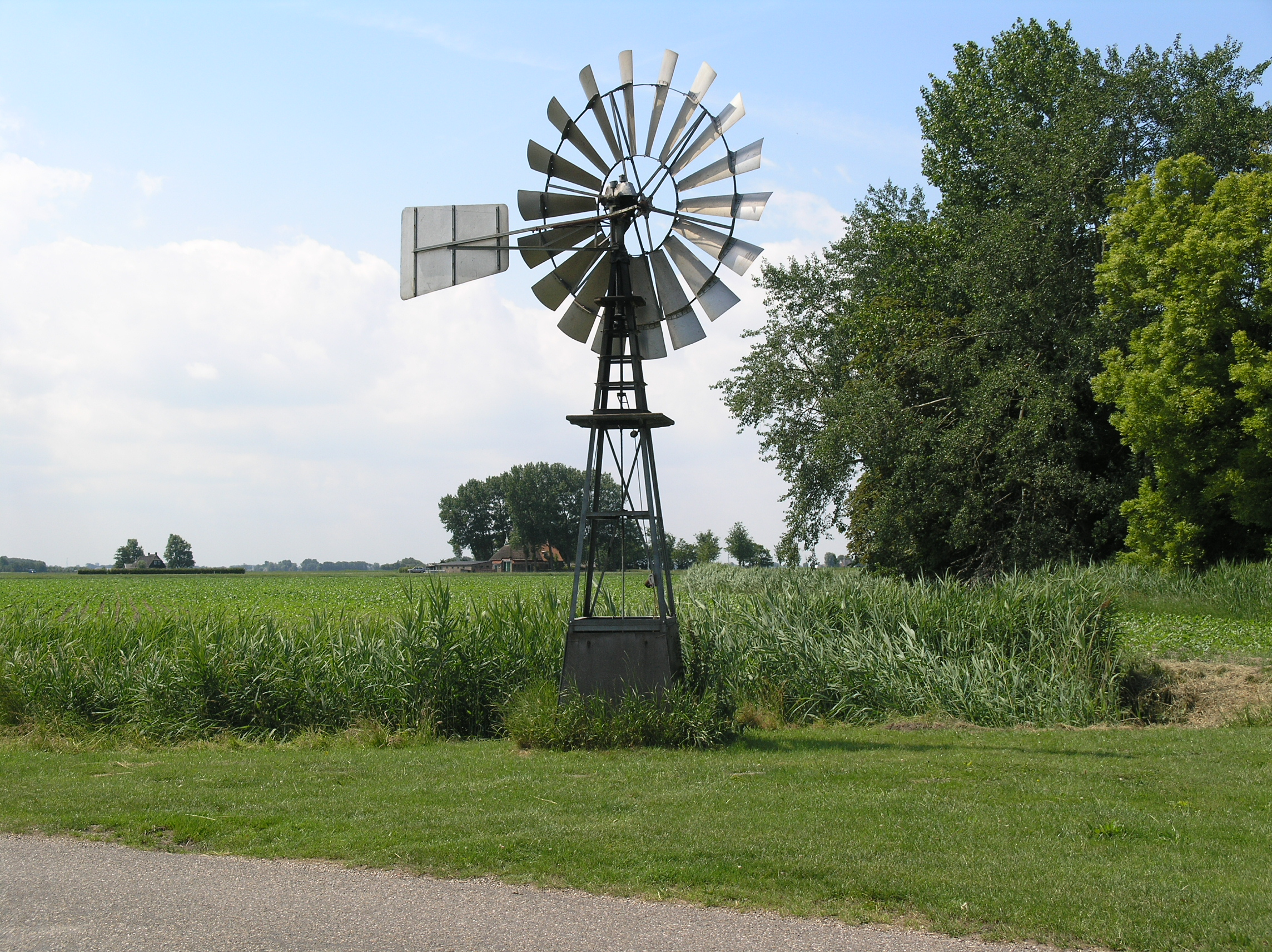 Oosternijkerk Windmotor 2008